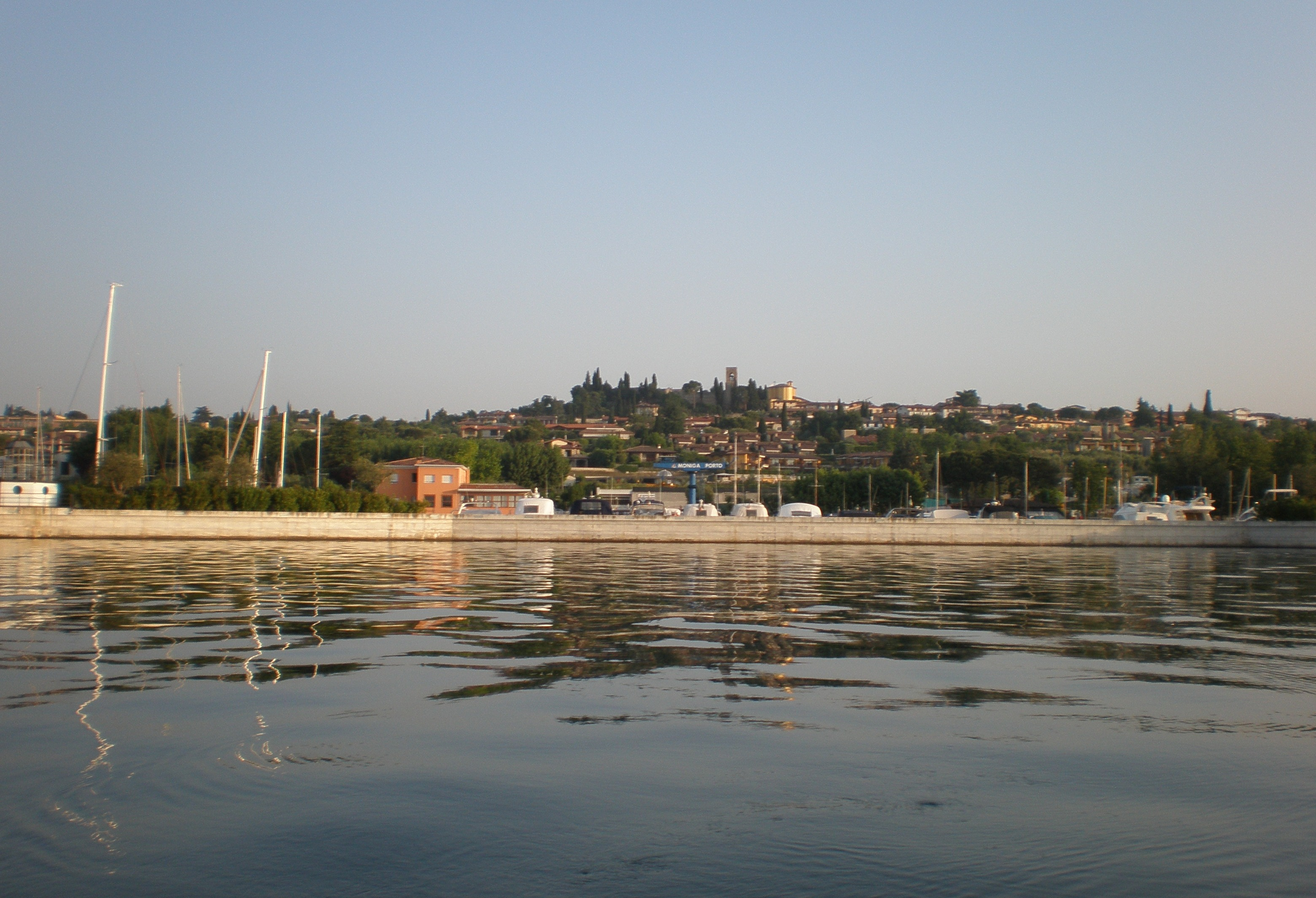 Moniga del Garda am frühen Morgen